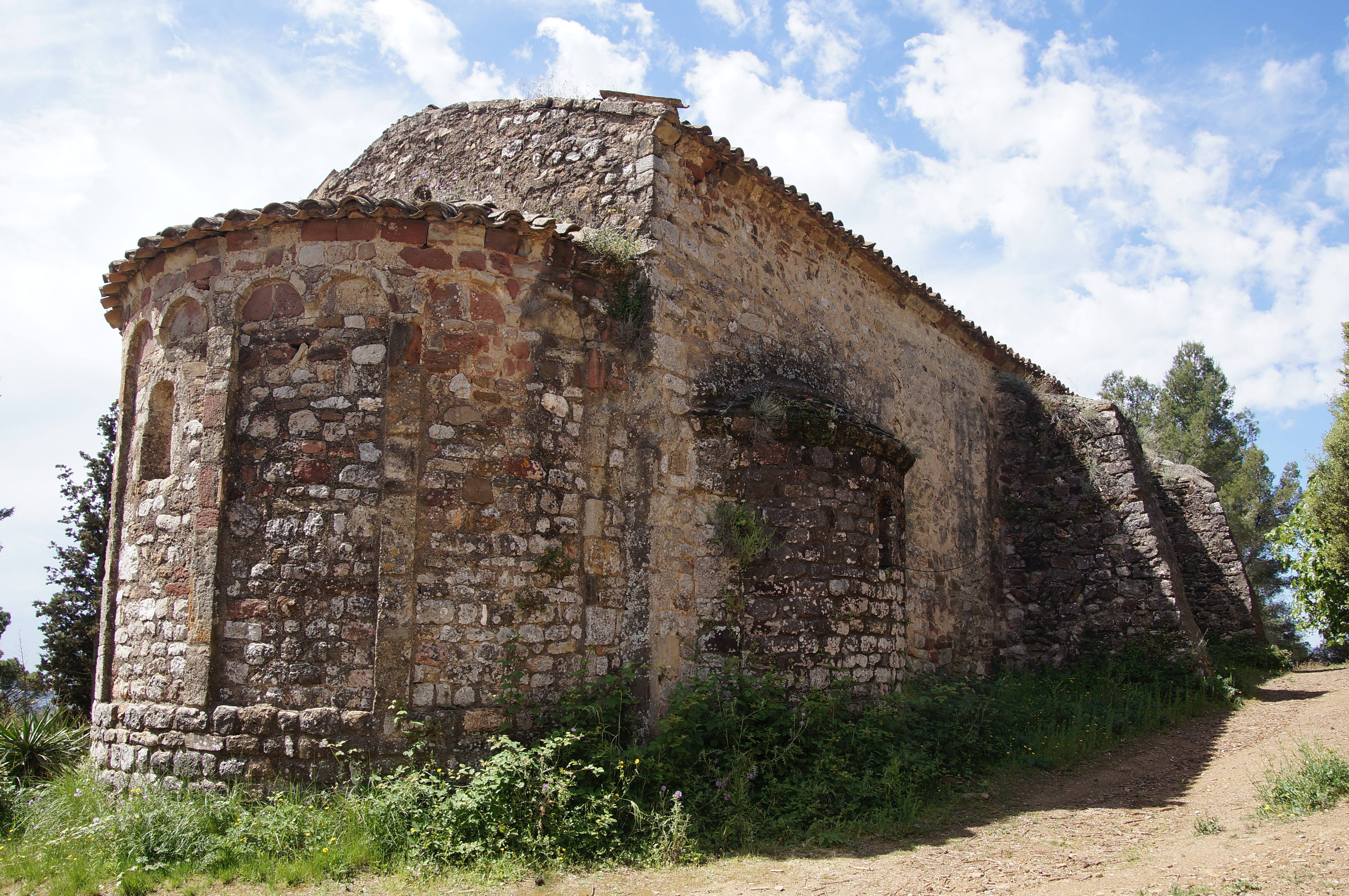 Ermita de la Mare de Déu de la Salut (el Papiol)